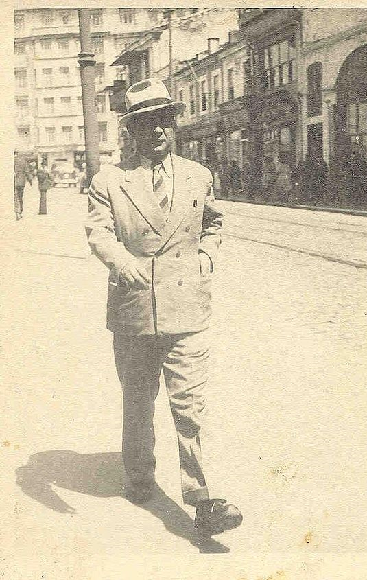 Necati Çelim 1940'lar